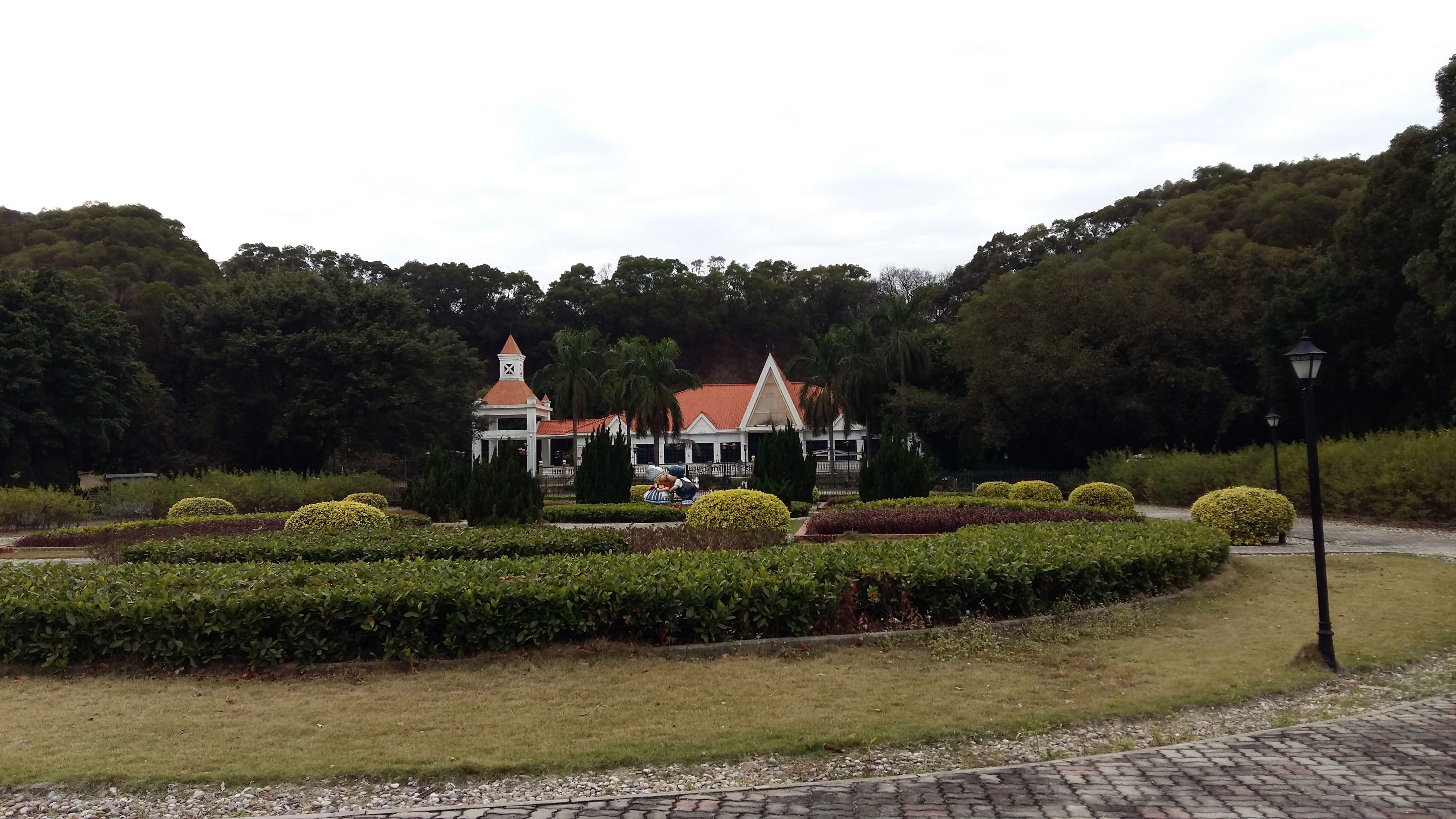 粵語: 蒲州花園入面嘅西式建築